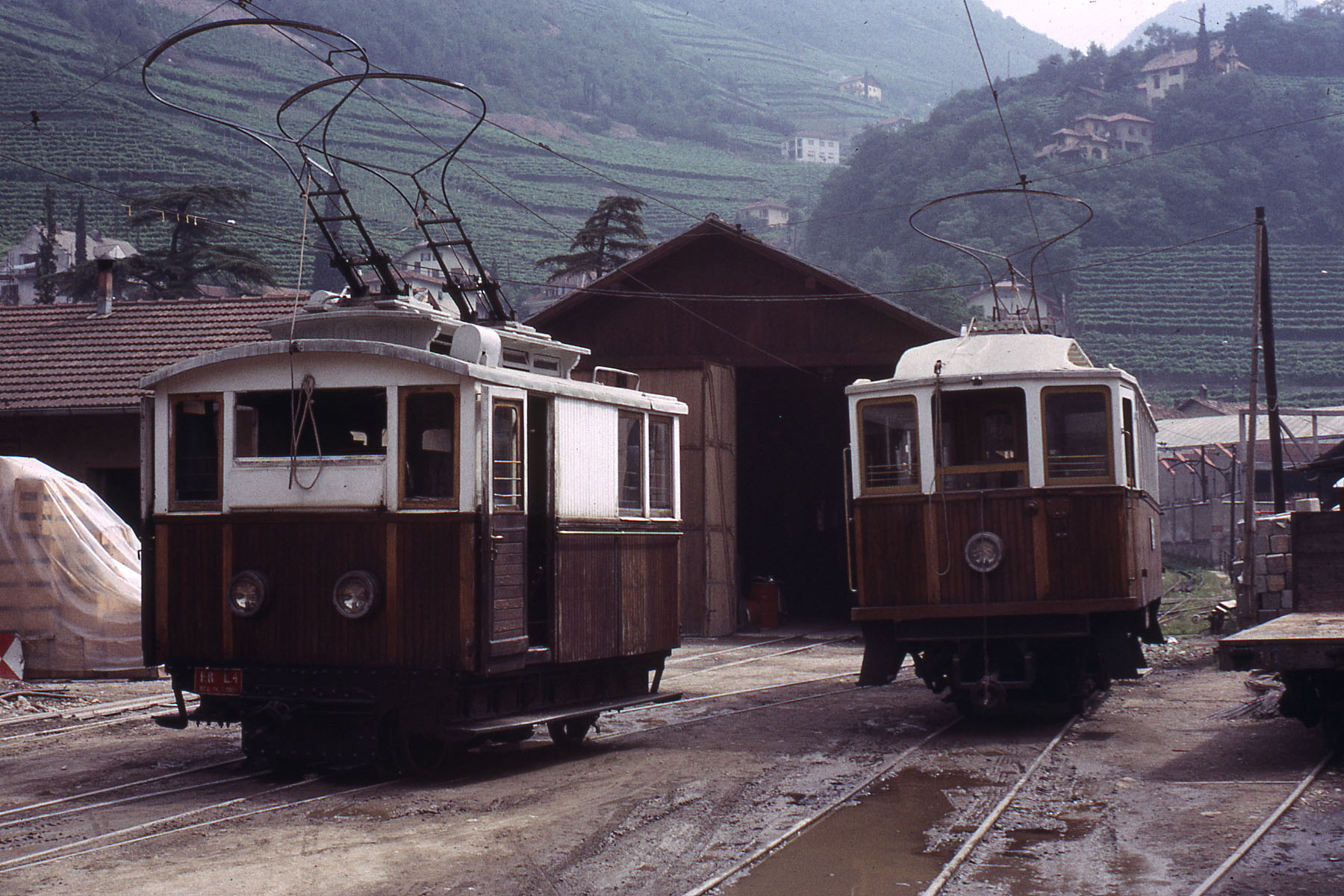 Rittnerbahn, Zahnradlokomotive und Triebwagen in der Bozener Talstation.